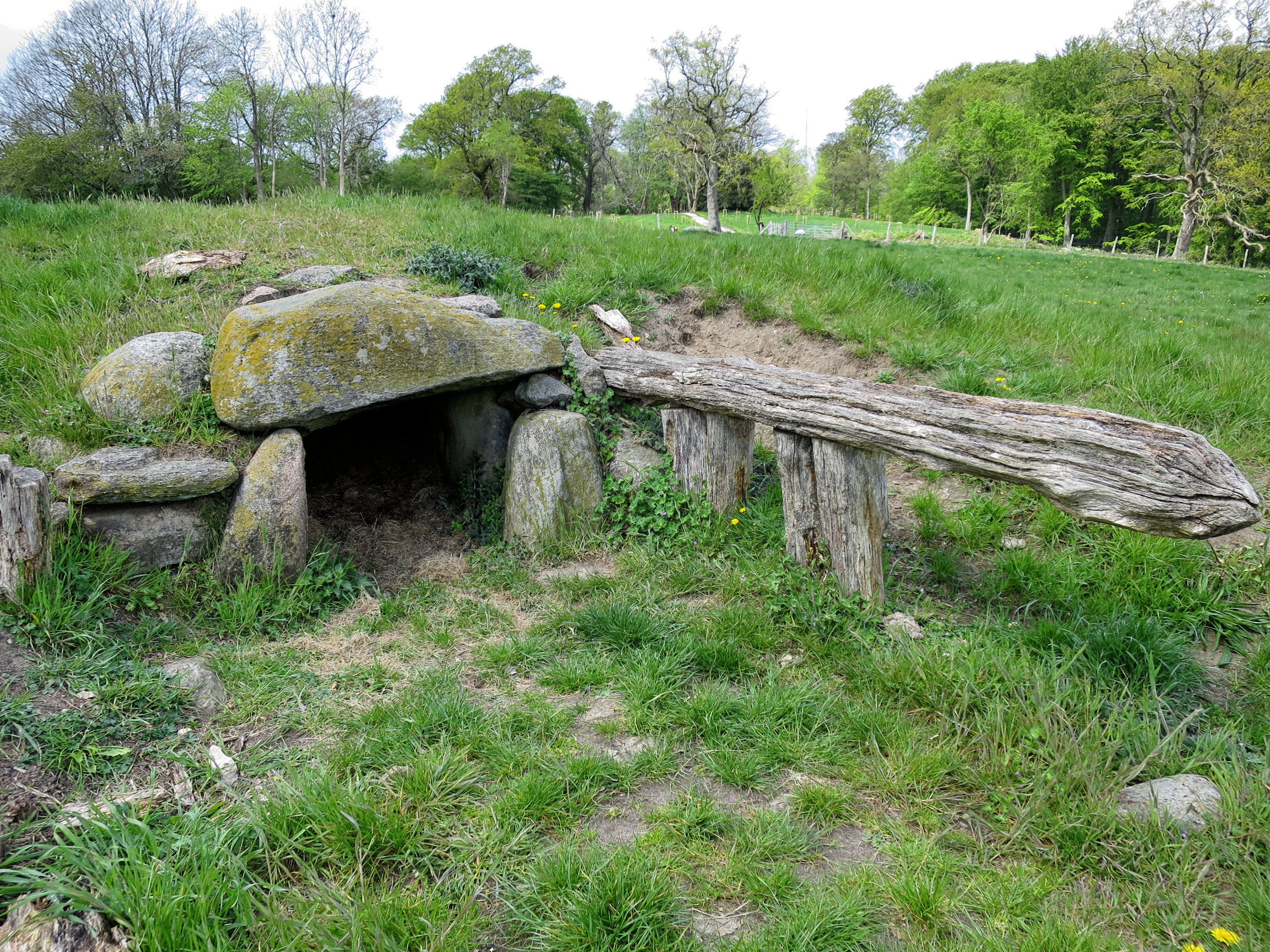 Kobberupkisten fra Skive rekonstrueret på Moesgård.